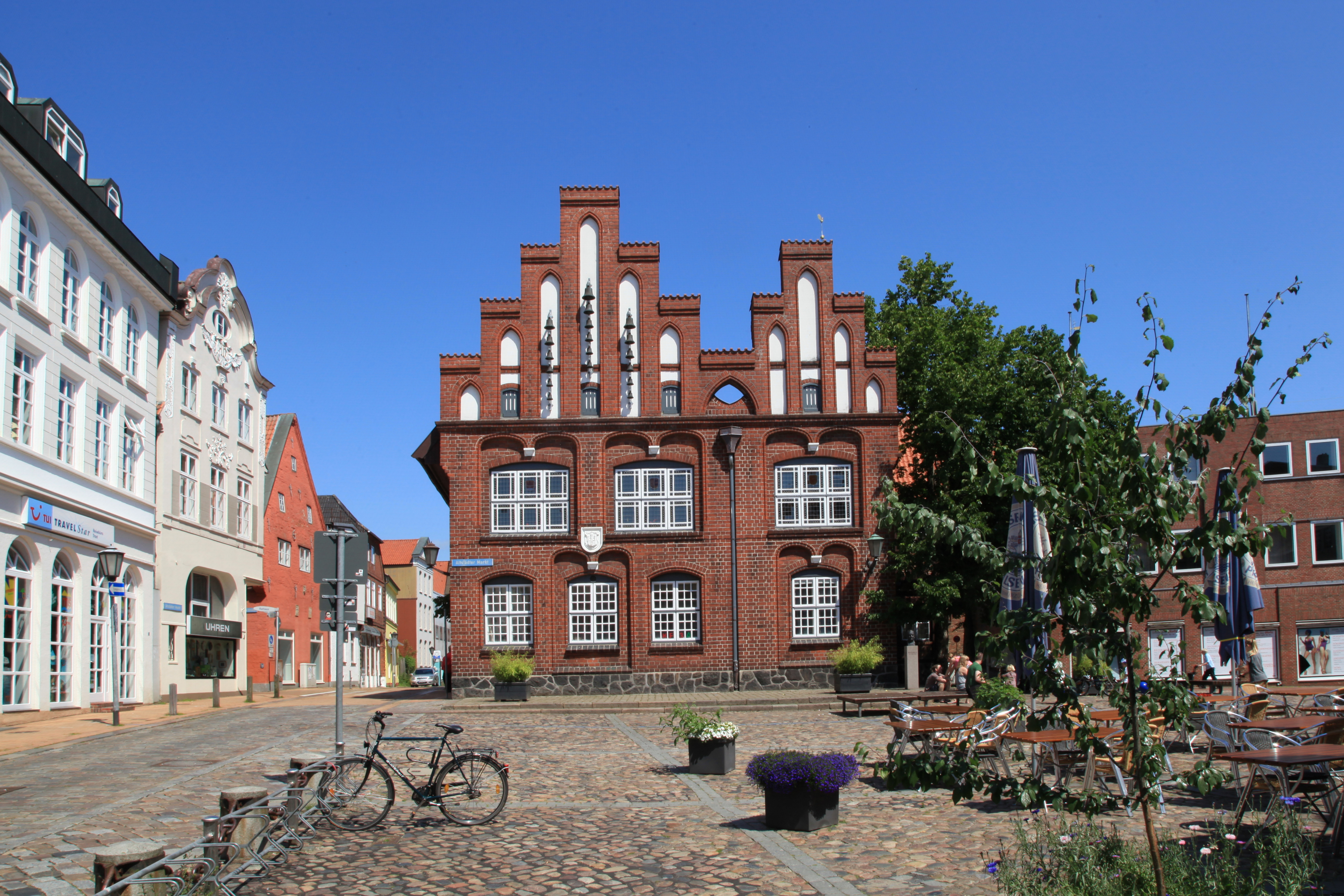 Mühlenstraße, Altstädter Markt und Altes Rathaus in Rendsburg